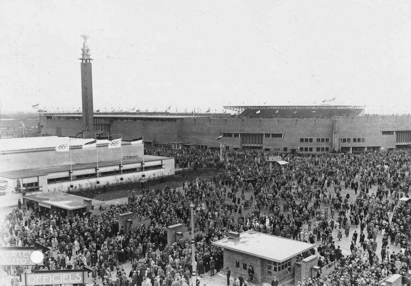 Die Eröffnung der olympischen Spiele in Amsterdam! Erste Aufnahmen vom Aufmarsch der Nationen im olympischen Stadion, unseres nach Amsterdam entsandten Sonder-Bild-Berichterstatters! Blick in das große olympische Stadion mit den ungeheuren Menschenmassen während der Eröffnung.